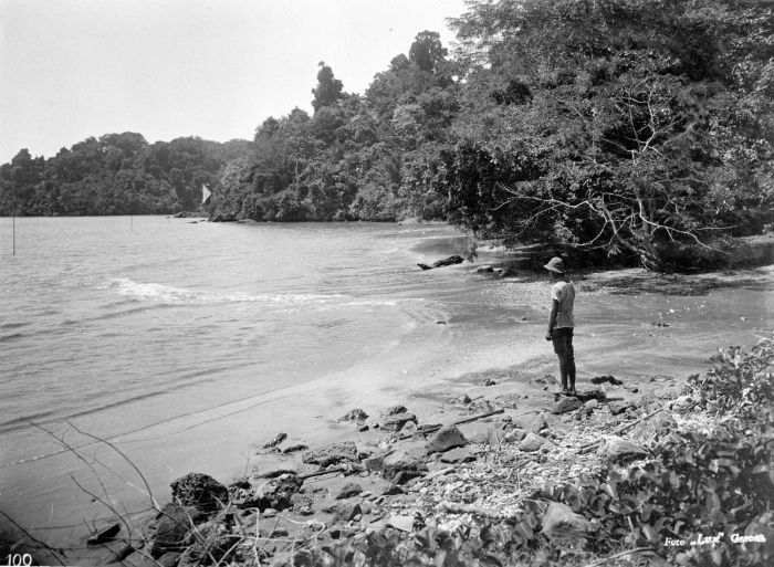 Foto. De zuidkust van Noesa Kambangan.